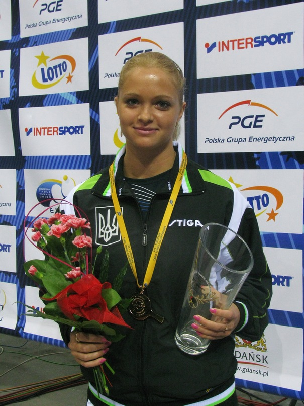 Маргарита Песоцька - бронзова призерка чемпионату Европи з настільного тенісу, Ґданьск - Сопот 2011